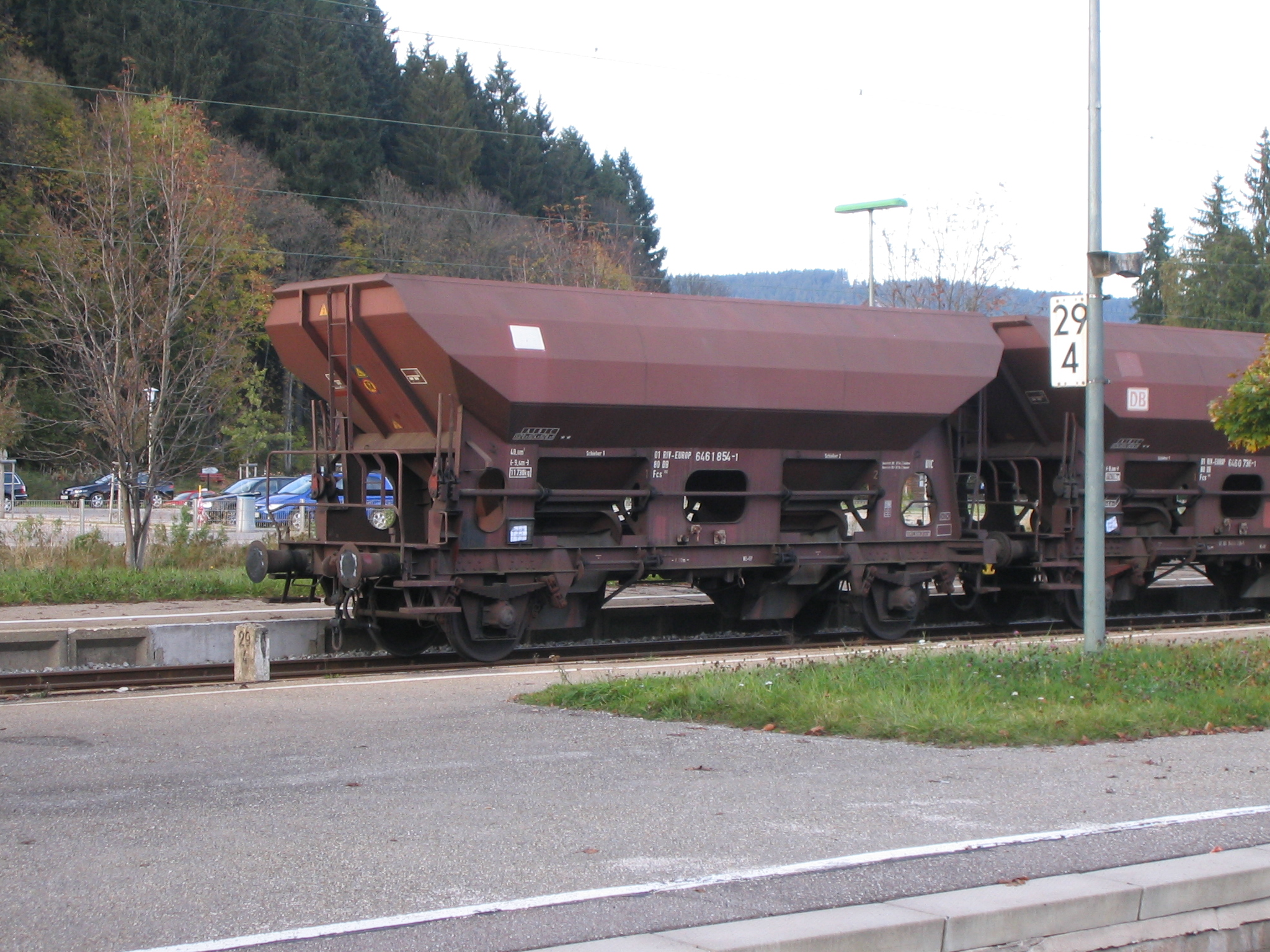 Drehschieber-Seitenentladewagen in Titisee